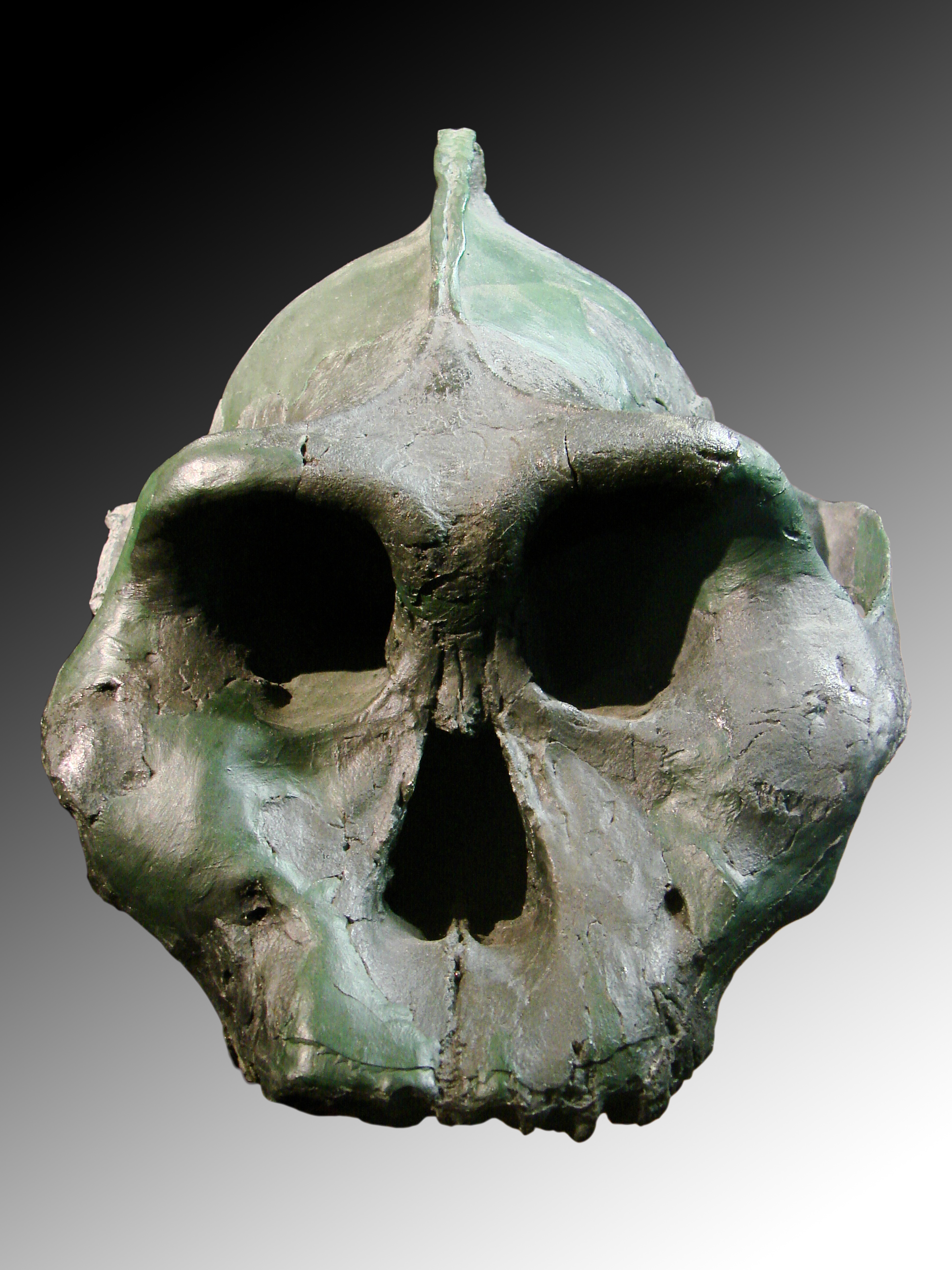 Muséum d'Anthropologie, campus universitaire d'Irchel, Université de Zurich (Suisse) : Paranthropus aethiopicus, reconstitution du crâne noir (numéro d'inventaire KNM WT 17000). Âge : - 2.5 millions d'années. Découverte : Lomekwi, basse vallée de l'Omo, Kenya.